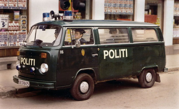 Politibil, VW Caravelle, folkevogn. irma butikkskilt.